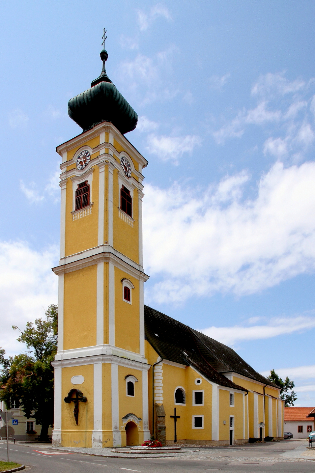 Die katholische Pfarrkirche hll. Peter und Paul in Hadersdorf, ein Ortsteil der niederösterreichischen Marktgemeinde Hadersdorf-Kammern.